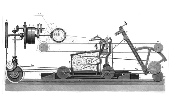 Technische Zeichnung einer Selfactor-Maschine aus Meyer's Conversationlexikon von 1888